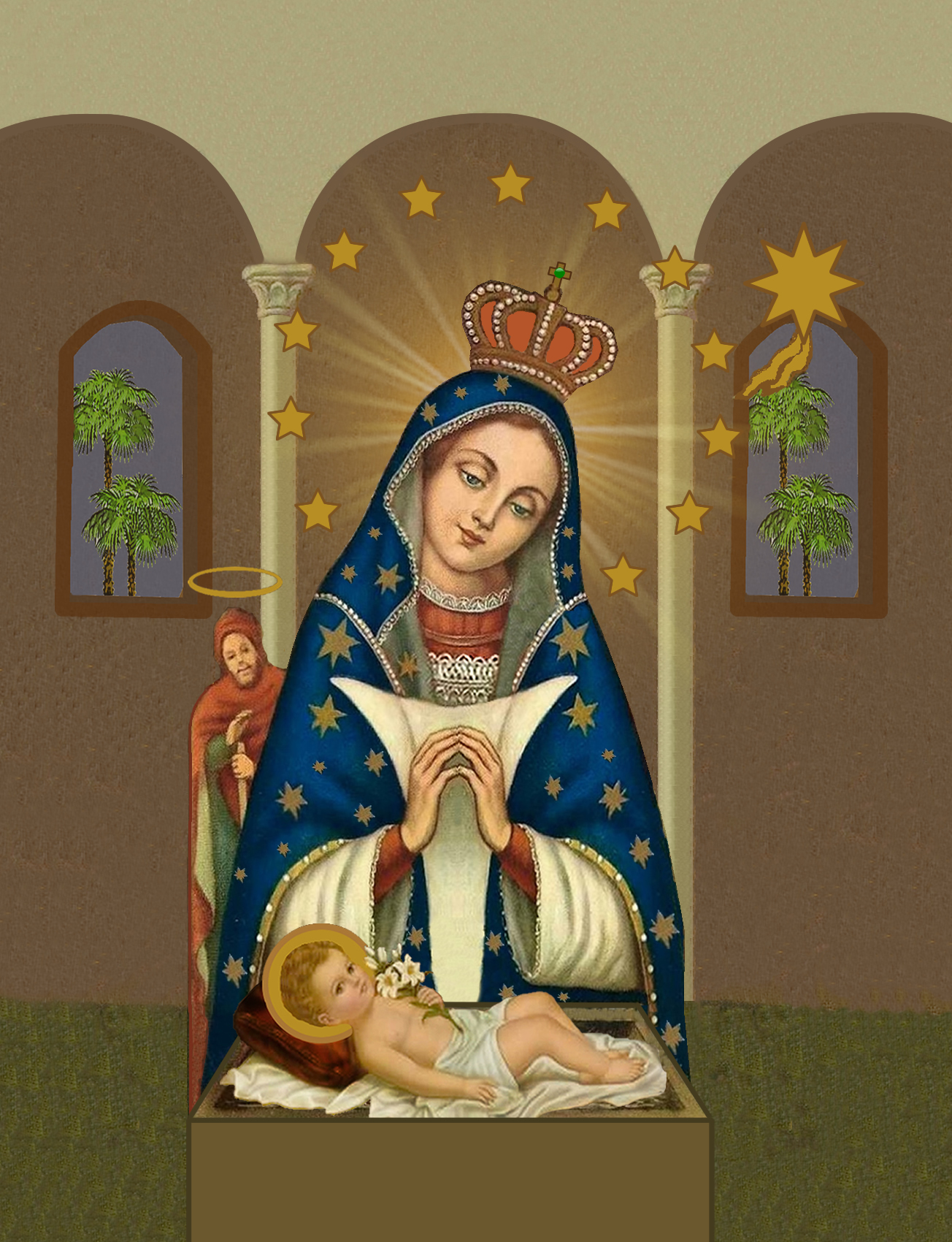 Estampa Contemporánea de Nuestra Señora de la Altagracia